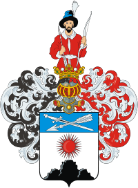 Герб рода Аксёновых